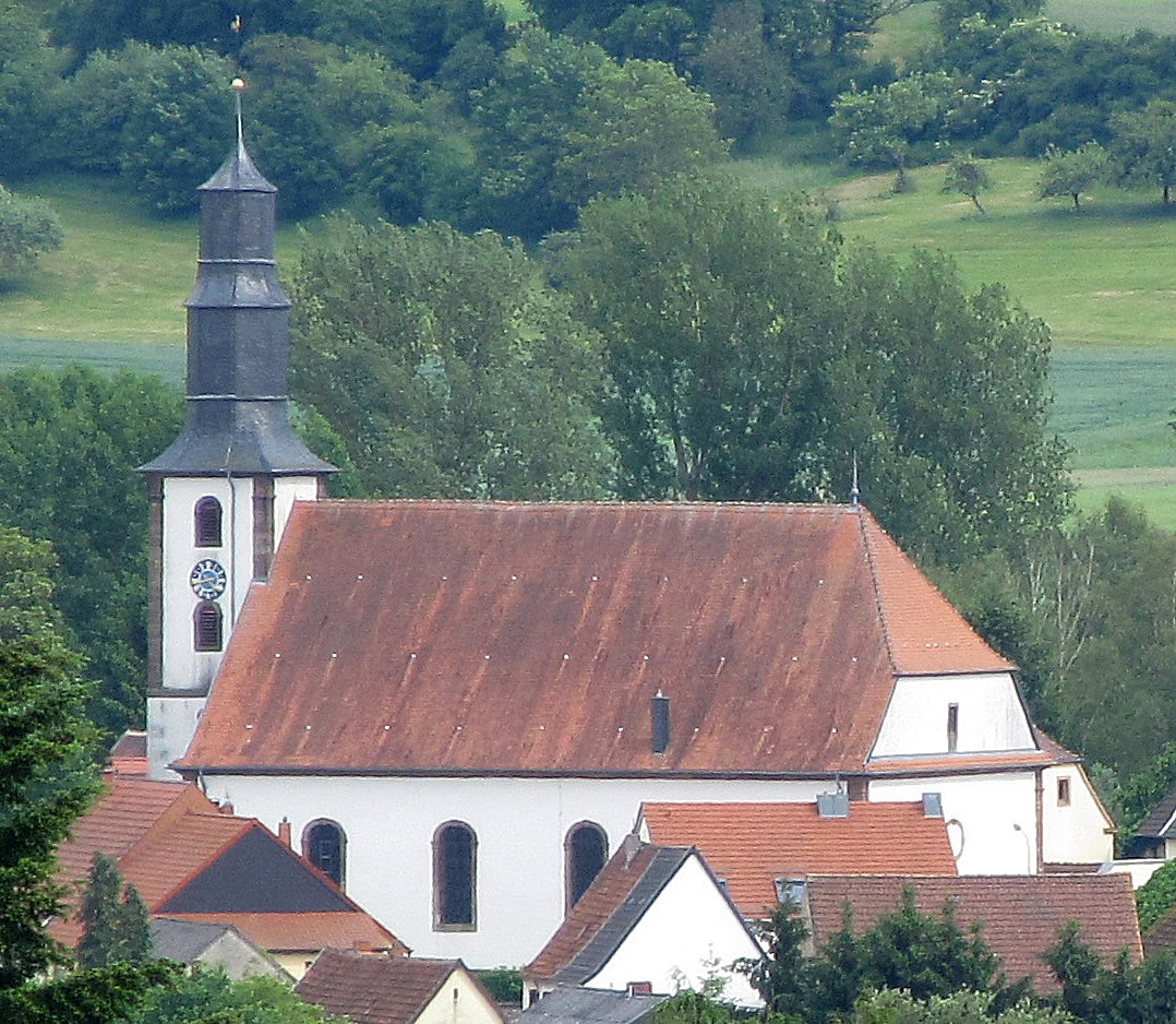 Protestantische Christuskirche Mimbach, Stadt Blieskastel, Saarpfalz-Kreis, Saarland